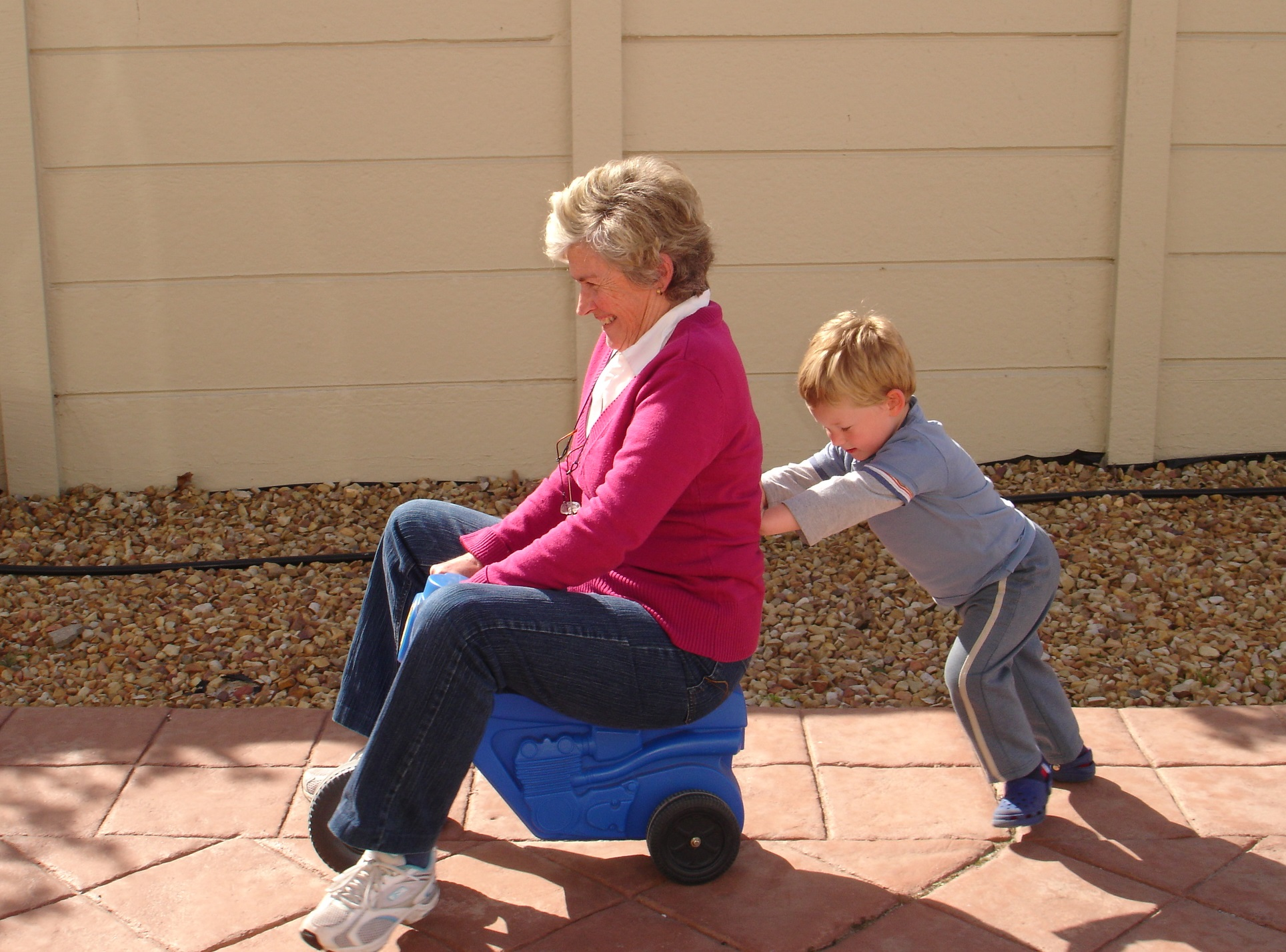 Matti